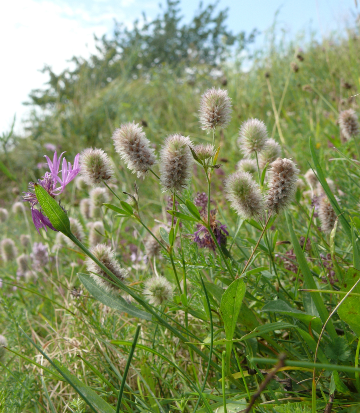 Trifolium arvense, Frankenhöhe, Germany